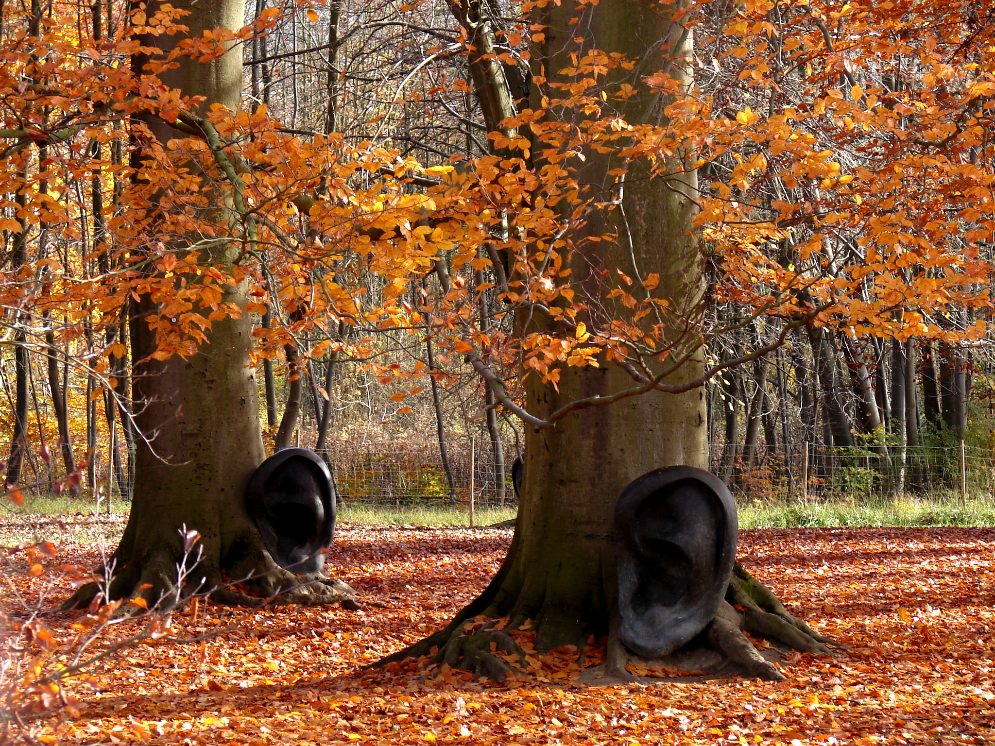 Park in Straßburg Robertsau, Bäume mit Ohren